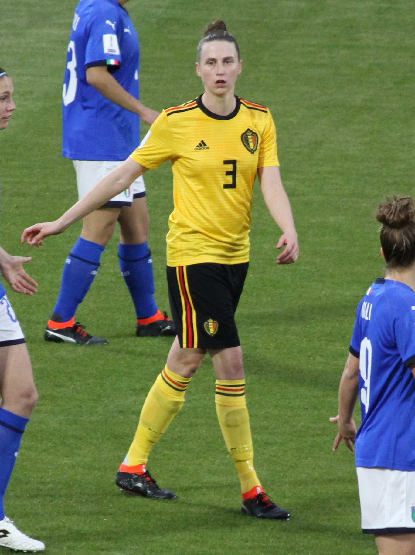 Heleen Jaques, difensore della nazionale di calcio femminile del Belgio, durante l'incontro Italia-Belgio del 10 aprile 2018 allo stadio Paolo Mazza di Ferrara.